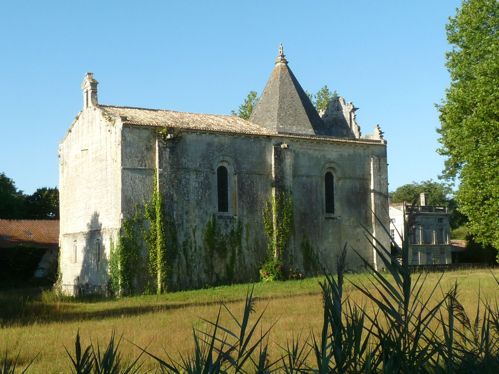 chapelle du château de la Tenaille (17), France